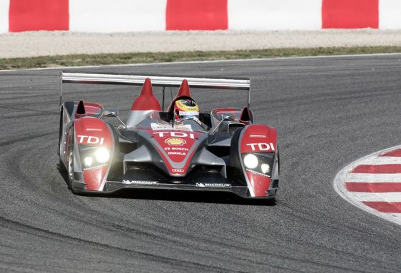 el Audi R10 TDI, un sport prototipo muy reconocido por ser el primer coche con Motor Diésel en ganar las 24 Horas de Le mans